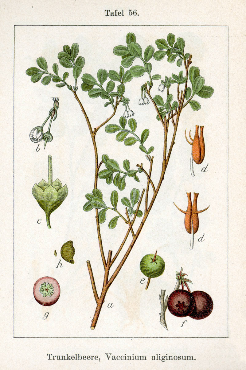 Vaccinium uliginosum L. s. l. Original Description Trunkelbeere, Vaccinium uliginosum